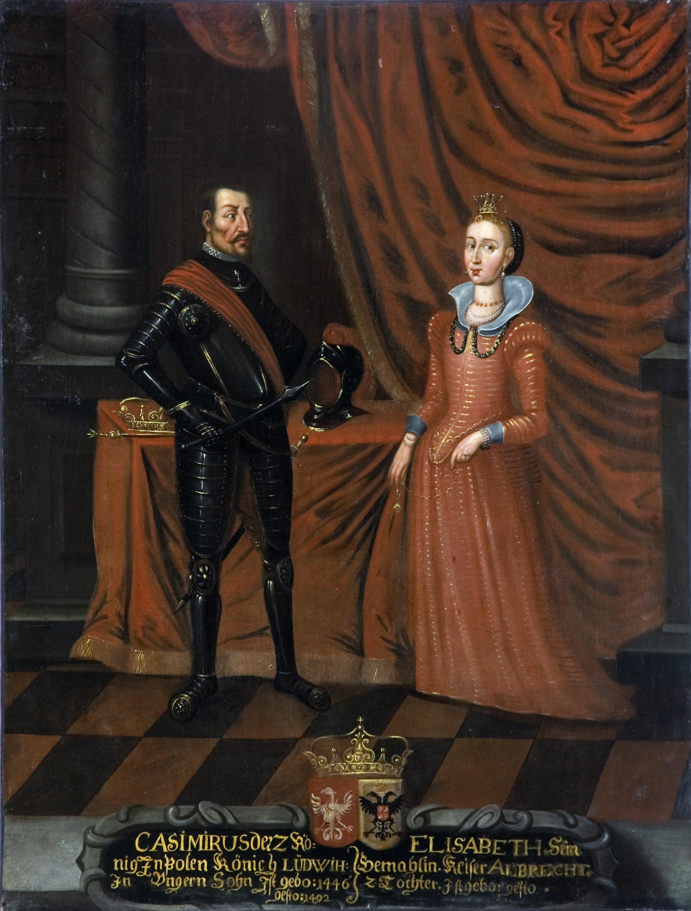 Беларуская (тарашкевіца): Партрэт вялікага князя літоўскага Казімера Ягайлавіча (Kazimier Jagajłavič) і ягонай жонкі Альжбеты Аўстрыйскай (Elisabeth von Habsburg)